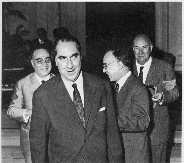 La foto raffigura Salvatore Romano, Pugliatti, La Pira e Antonino Giuffrè